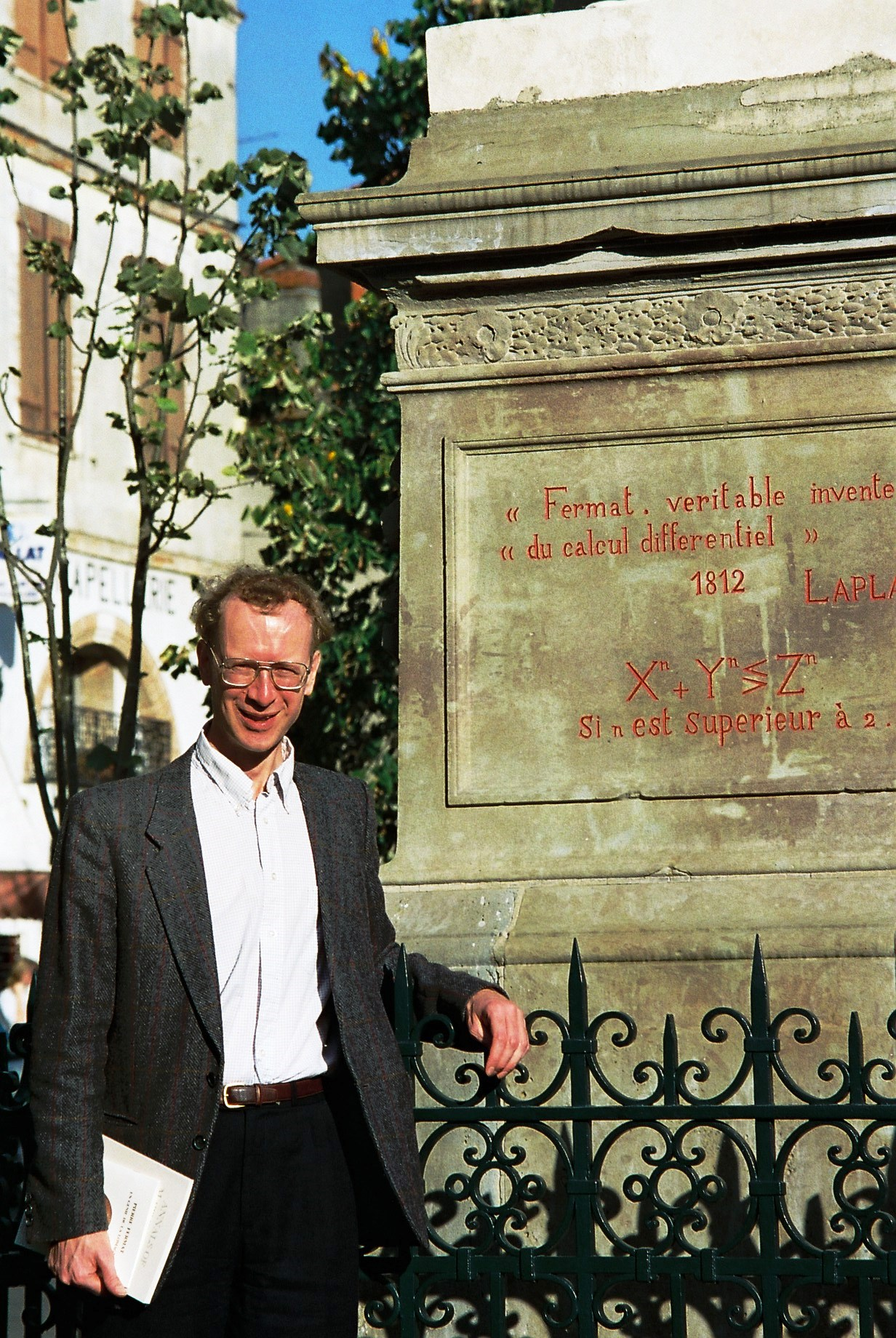 Andrew Wiles besucht Fermats Geburtsort und steht vor dem Fermat-Denkmal in Beaumont-de-Lomagne